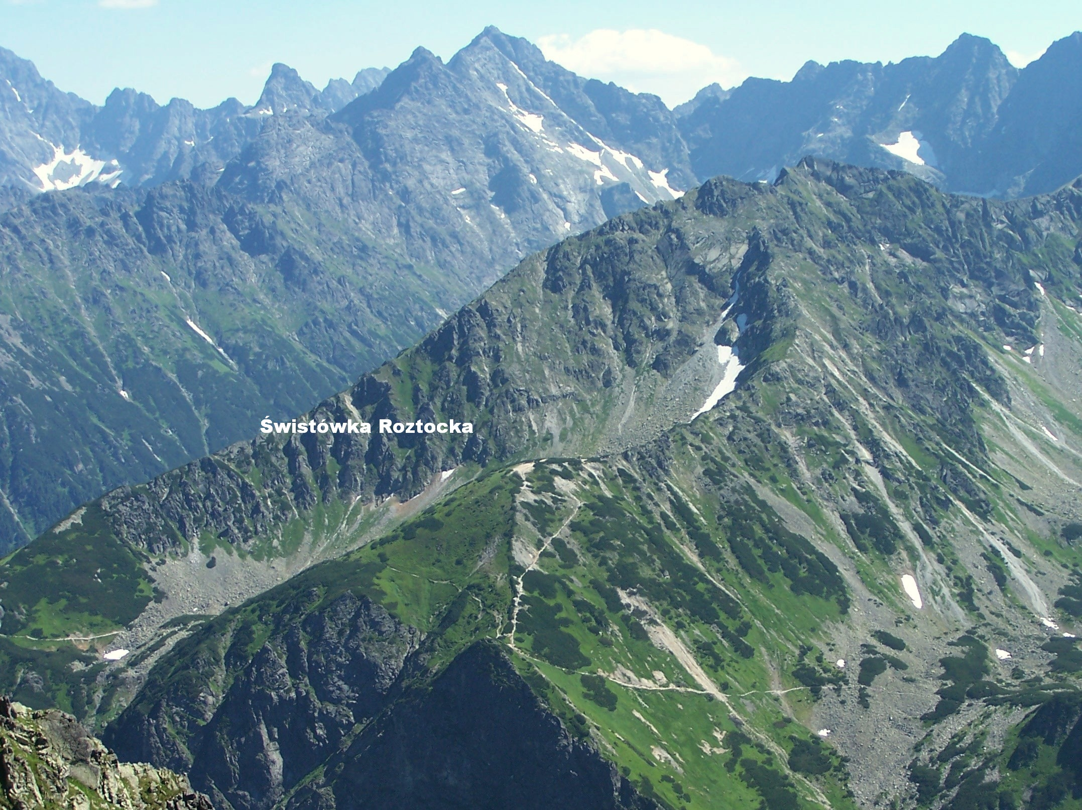 Świstówka Roztocka (Tatra Mountains)